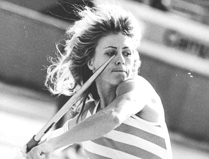 Petra Felke ADN-ZB Thieme 20.5.84 Karl-Marx-Stadt: Leichtathletik-Sportfest- Erneut wartete Petra Felke (SC Motor Jena) mit guten Leistungen im Speerwerfen auf. Ausgezeichnete 70,60 m waren diesmal das Siegerergebnis.